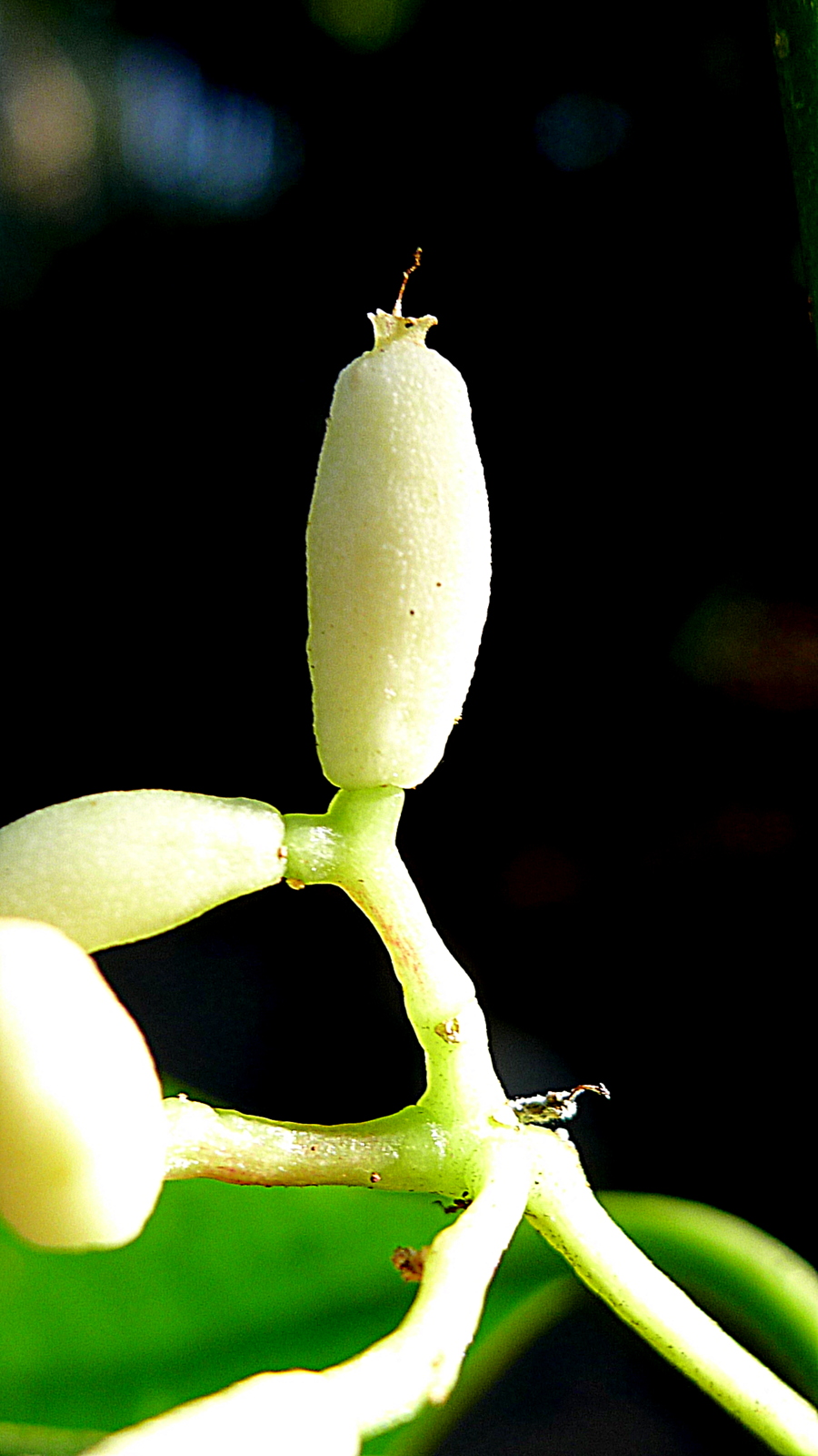 Neea laxa Poepp. & Endl.